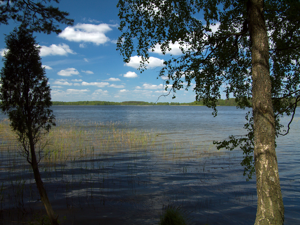 Baltieji Lakajai